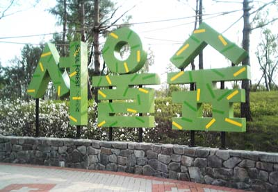 서울숲, 직접 촬영.